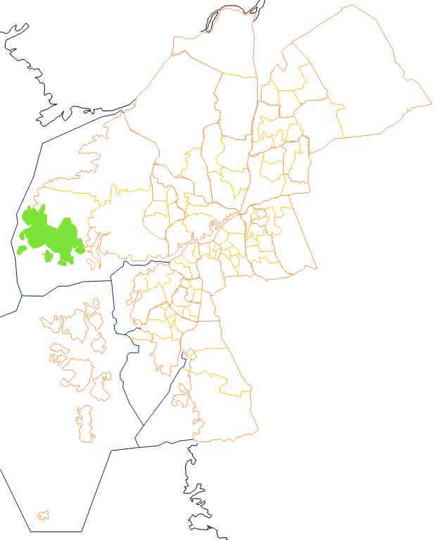 Karta som visar primärområdes belägenhet i Göteborg